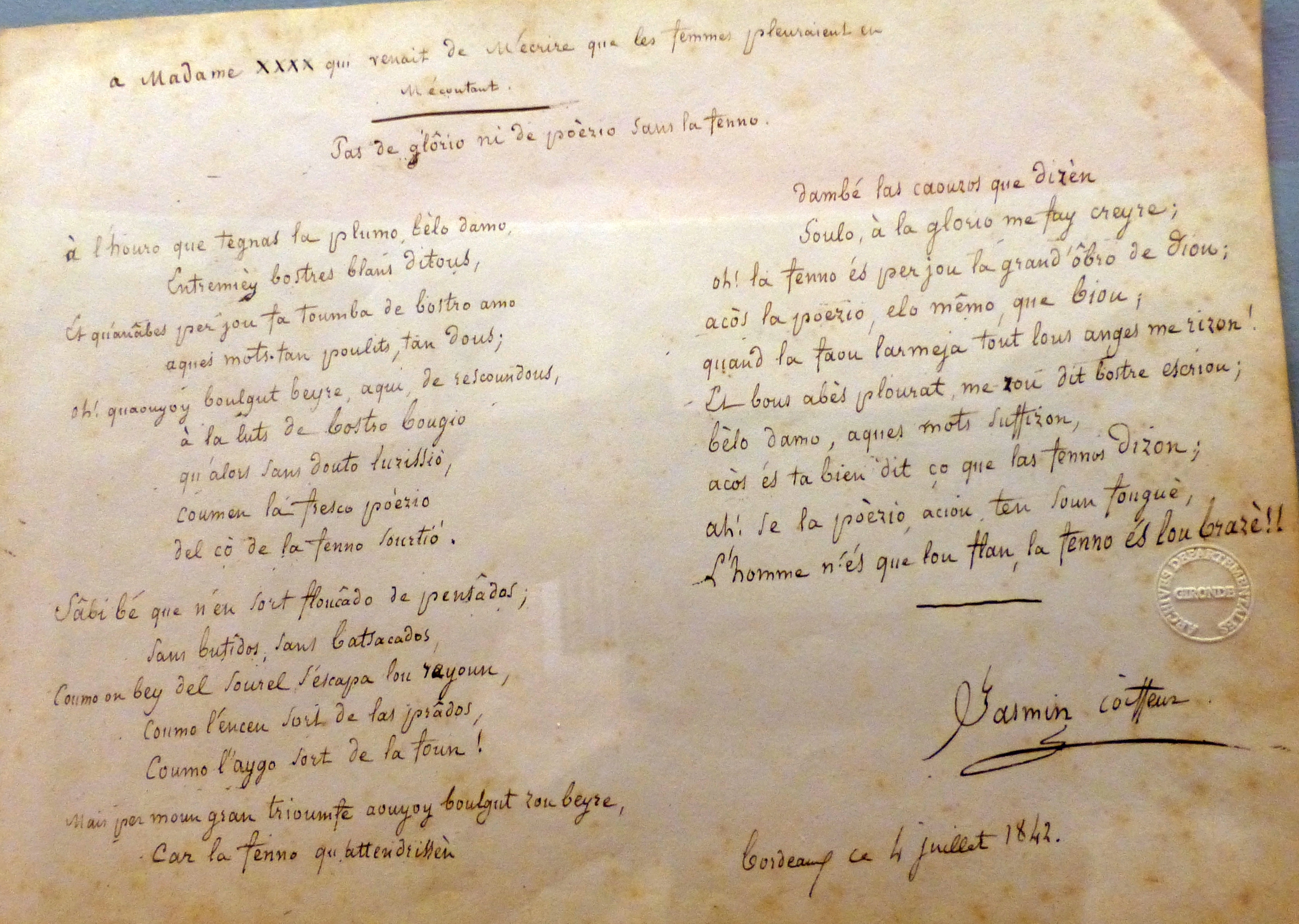 Bordeaux, Archives départementales de la Gironde, poème autographe de Jacques Jasmin, 1843.